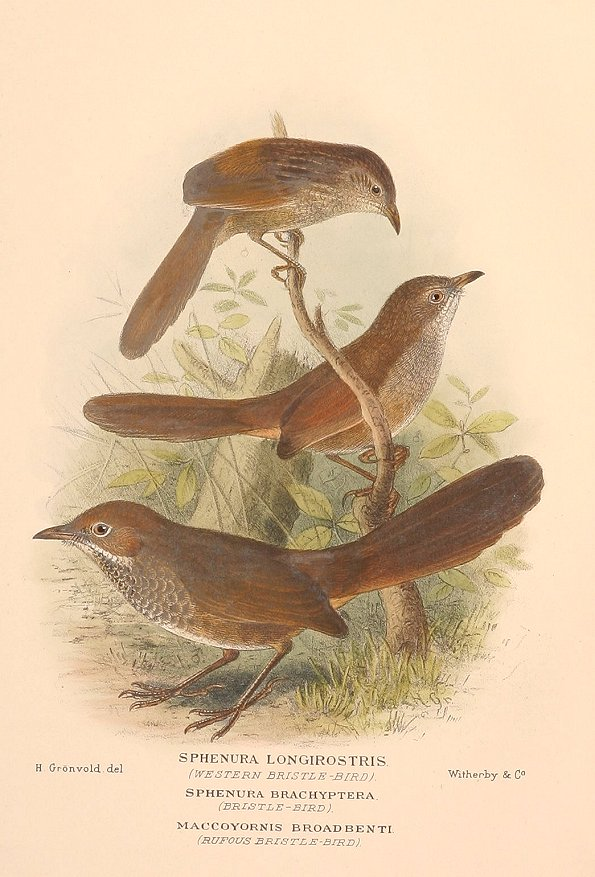 WESTERN, EASTERN & RUFOUS BRISTLEBIRD Western Bristlebird (Dasyornis longirostris) Eastern Bristlebird (Dasyornis brachypterus) Rufous Bristlebird (Dasyornis broadbenti)